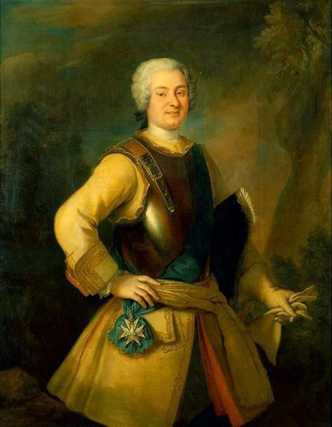 Graf Friedrich August von Rutowski (1702-1764)